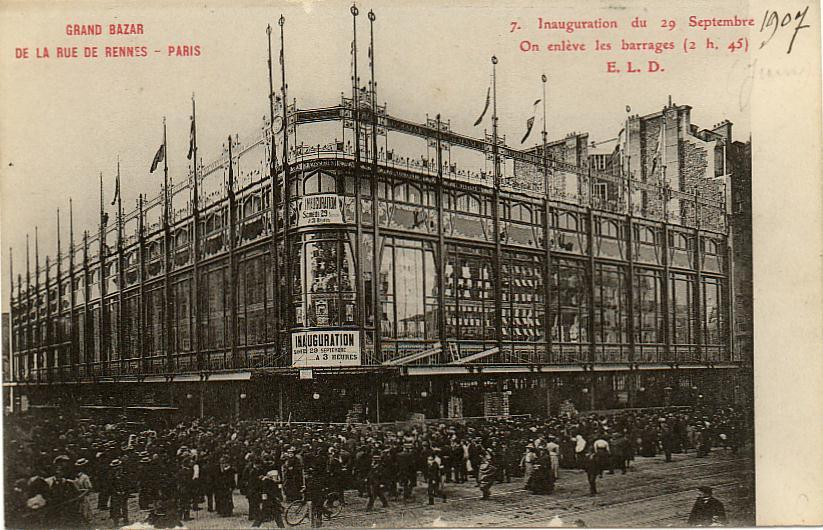 Le Grand Bazar de la rue de Rennes à Paris lors de son inauguration.